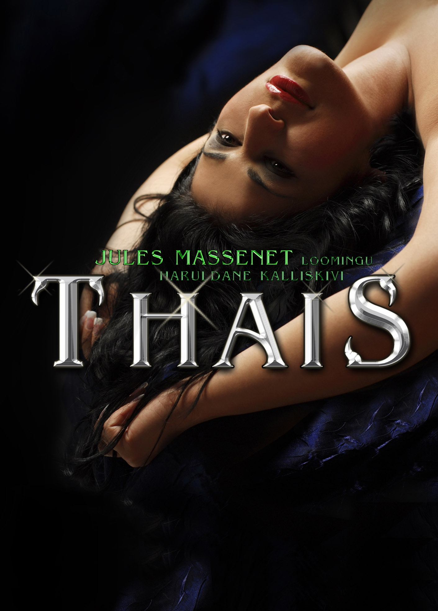 ooperi "Thais" lavastuse reklaamplakat, fotol Veronika Džiojeva, fotograaf Kaupo Kikkas